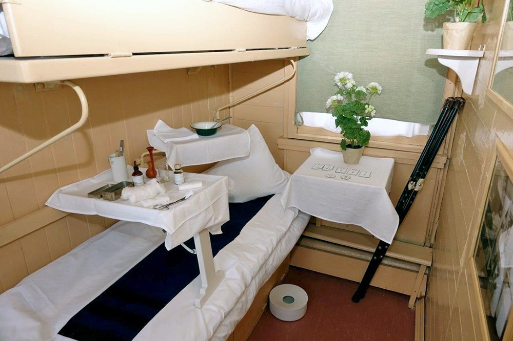 Койко-место раненого бойца в санитарном вагоне времен Великой отечественной войны